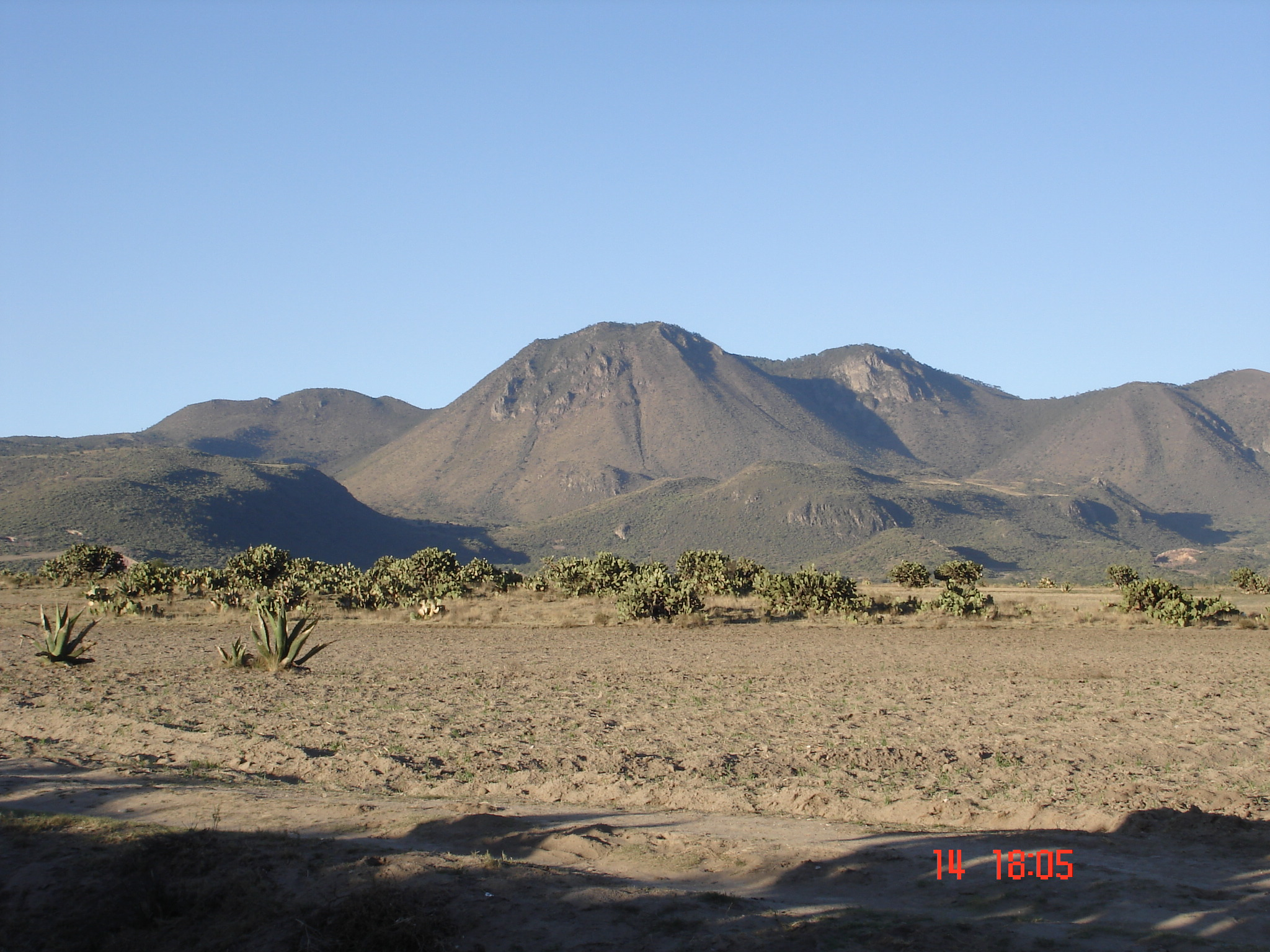 Cerro el Xihuingo, en las cercanias de Cd. Sahagún, Tepeapulco, Hidalgo, México